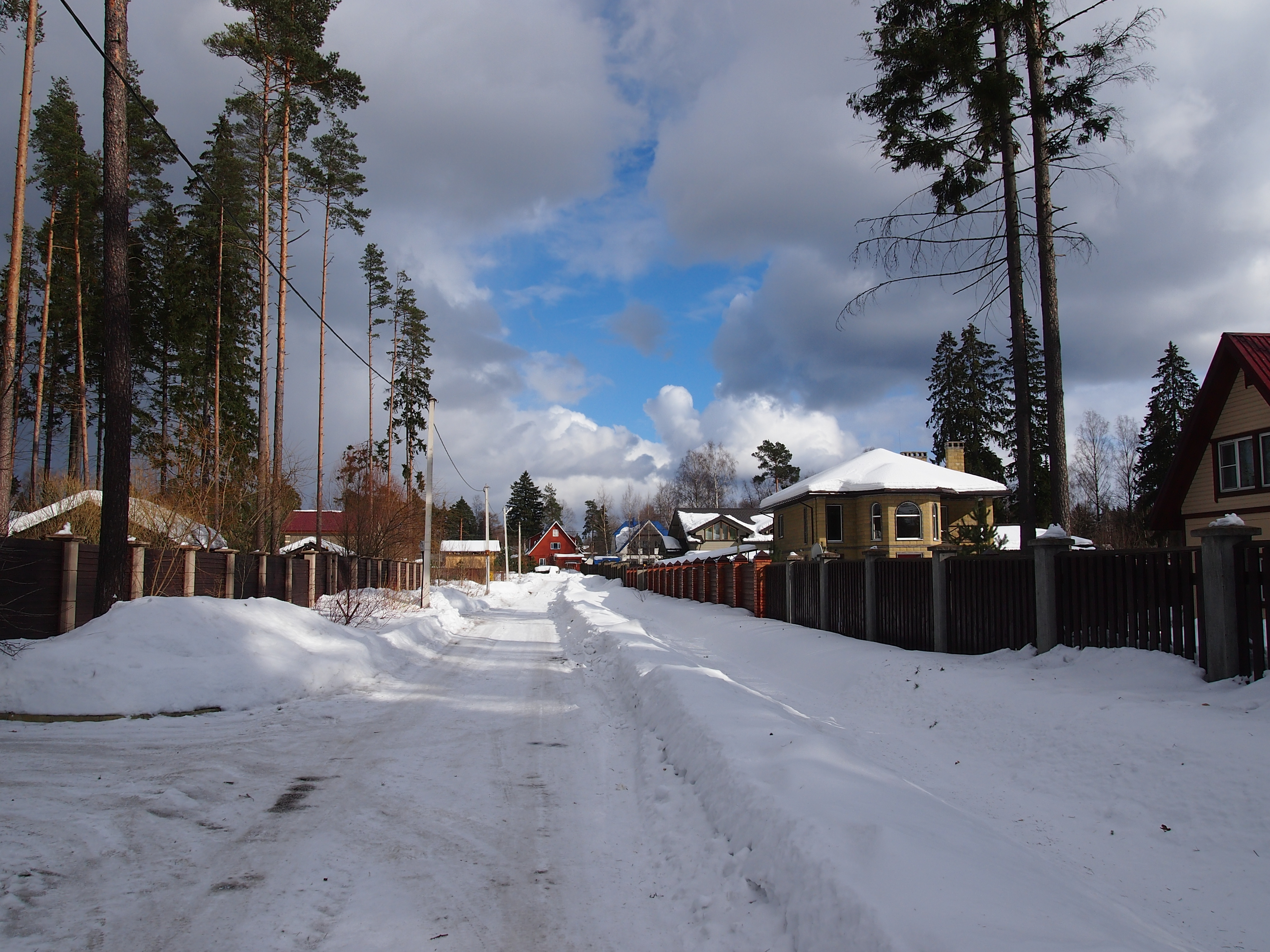 Городской посёлок Рощино, парковая улица.